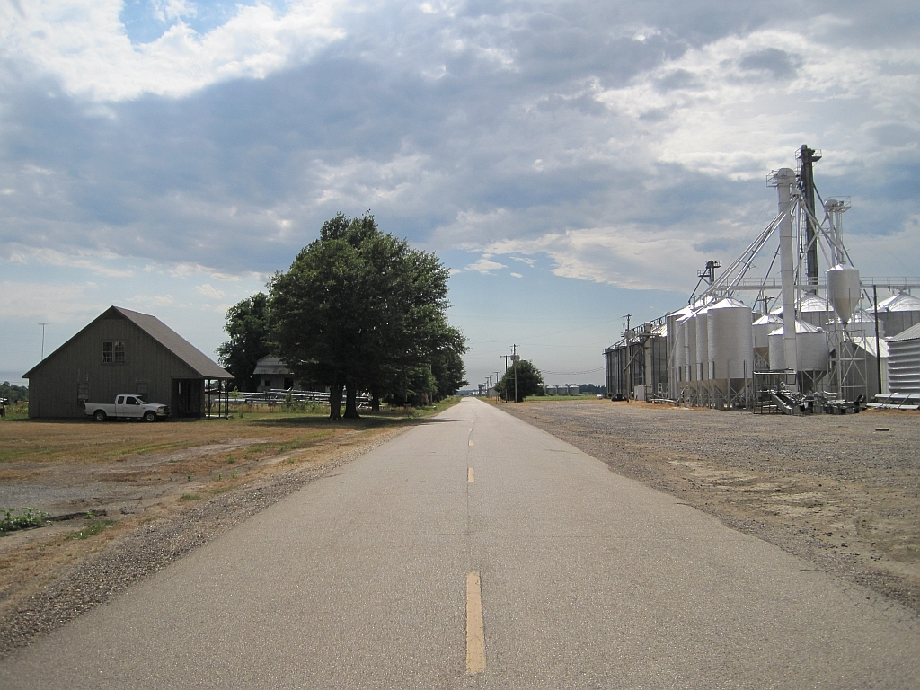 Twist, Arkansas.